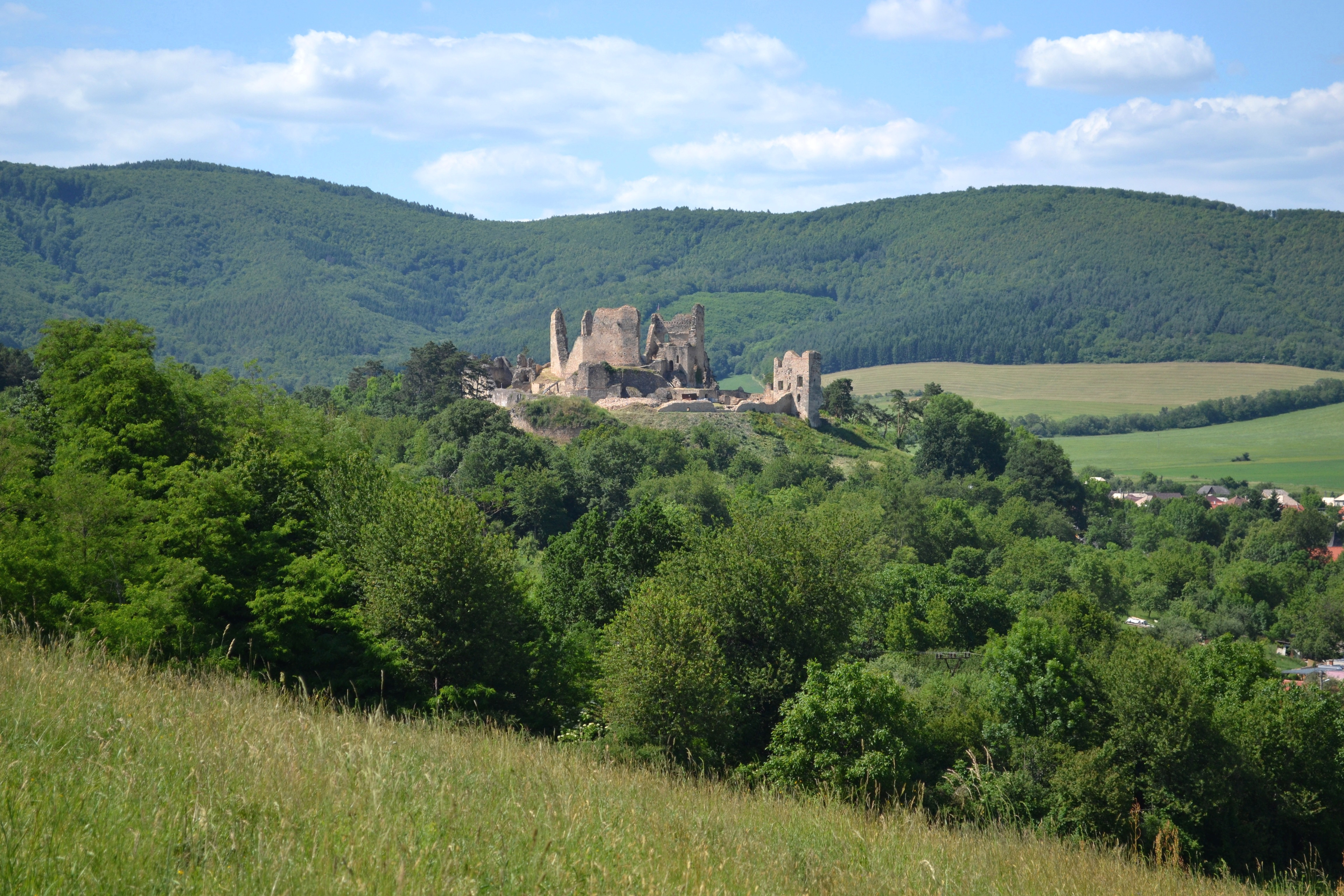 Divínsky hrad postavili koncom 13. storočia